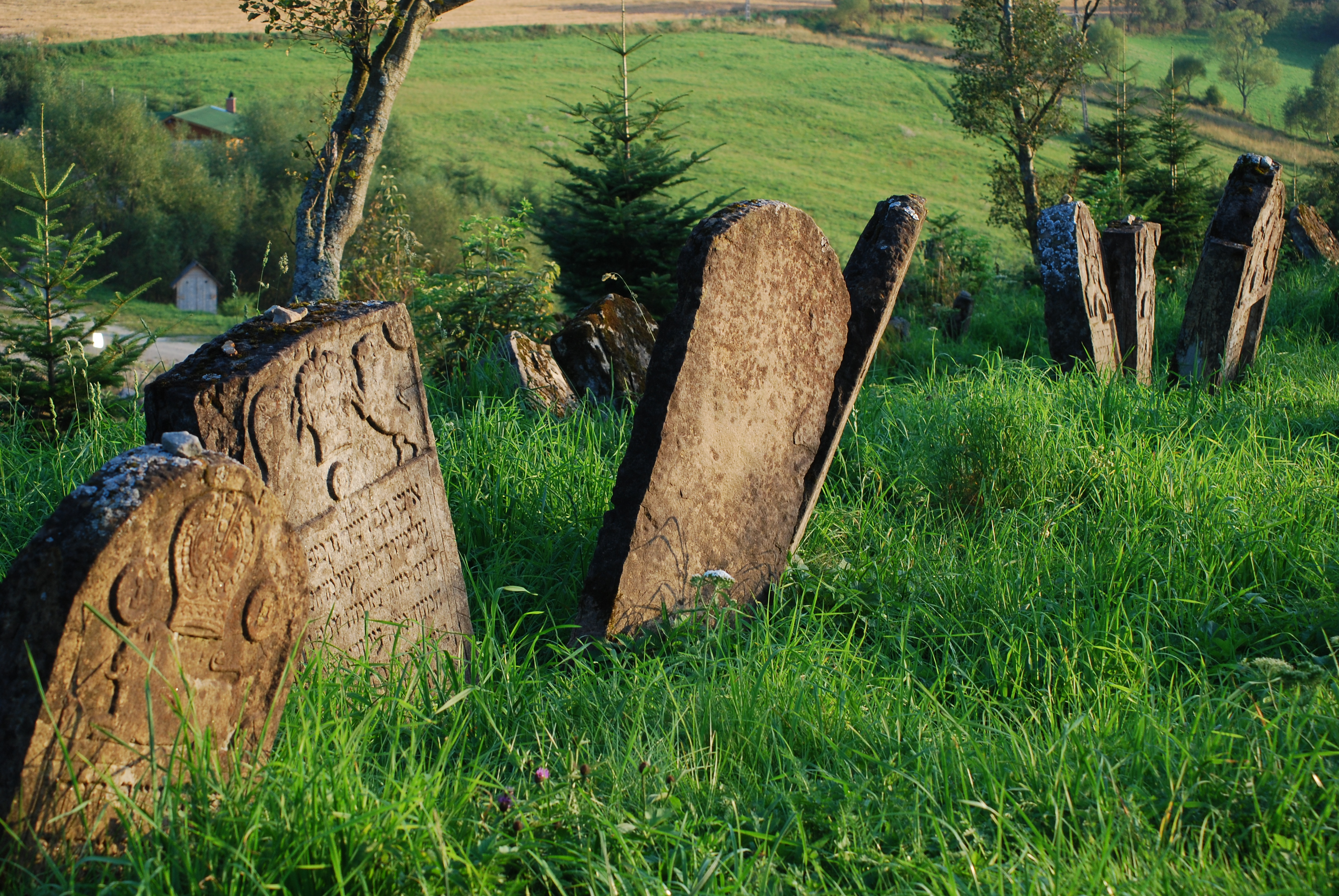 Jewish Cemetery in Lutowiska. Bieszczady Poland